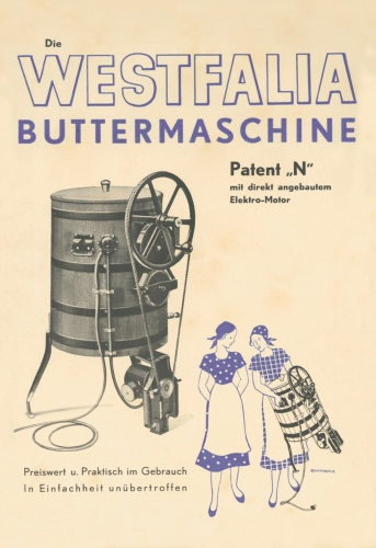 Werbung für eine Westfalia Butterungsmaschine